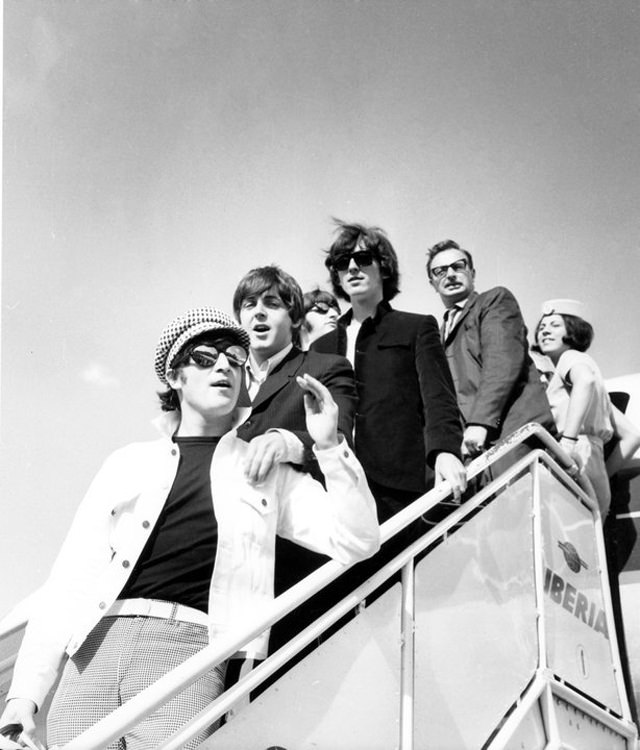 Los Beatles a su llegada a Madrid el 1 de julio de 1965.